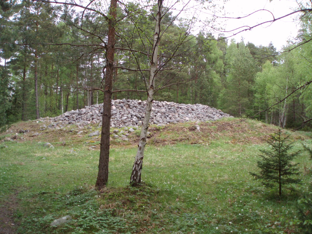 Detta röse ligger cirka 300 meter norr om stenskeppen.